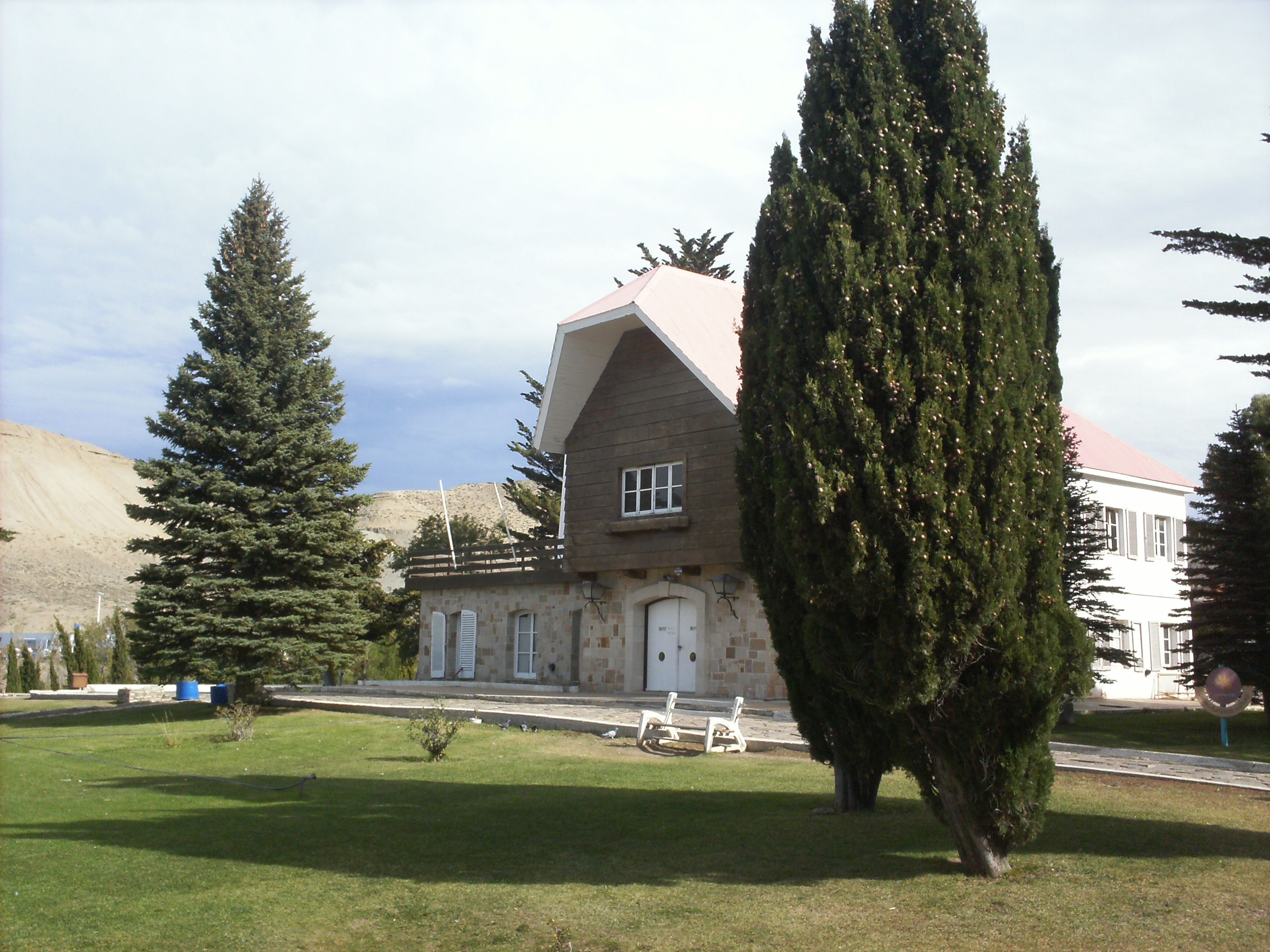 El Chalet Huergo desde el acantilado. General Mosconi, Provincia de Chubut.